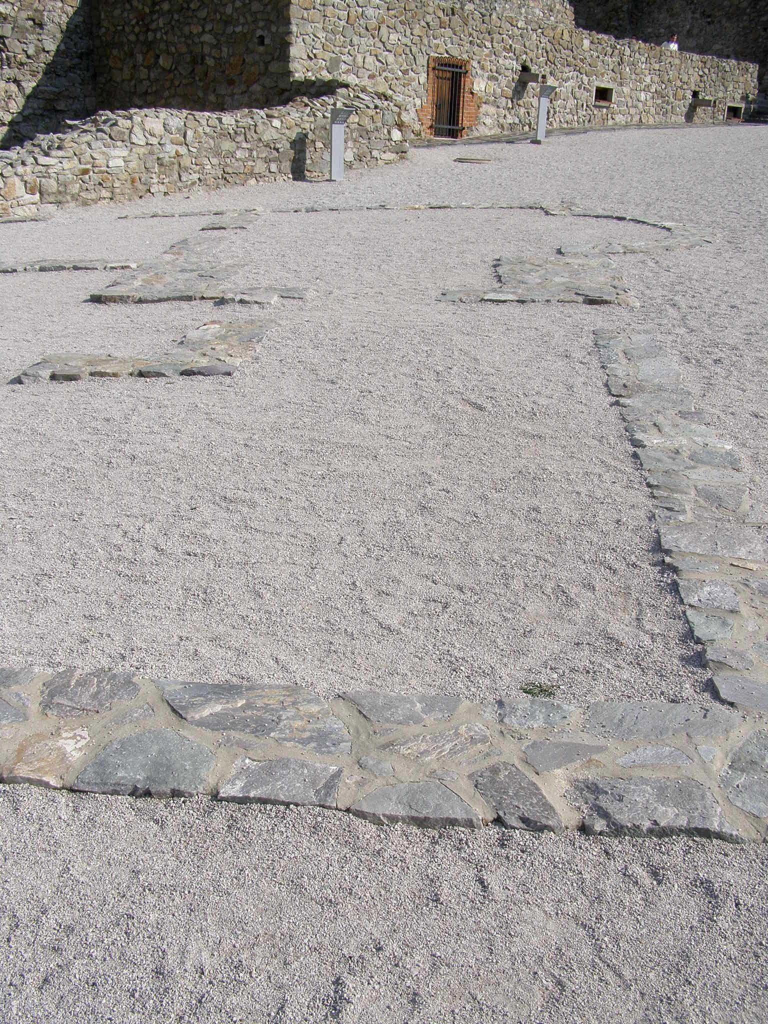 Základy rímskej stavby na strednom hrade Devínskeho hradu, objavené počas archeologického výskumu v 30-tych rokoch 20. storočia